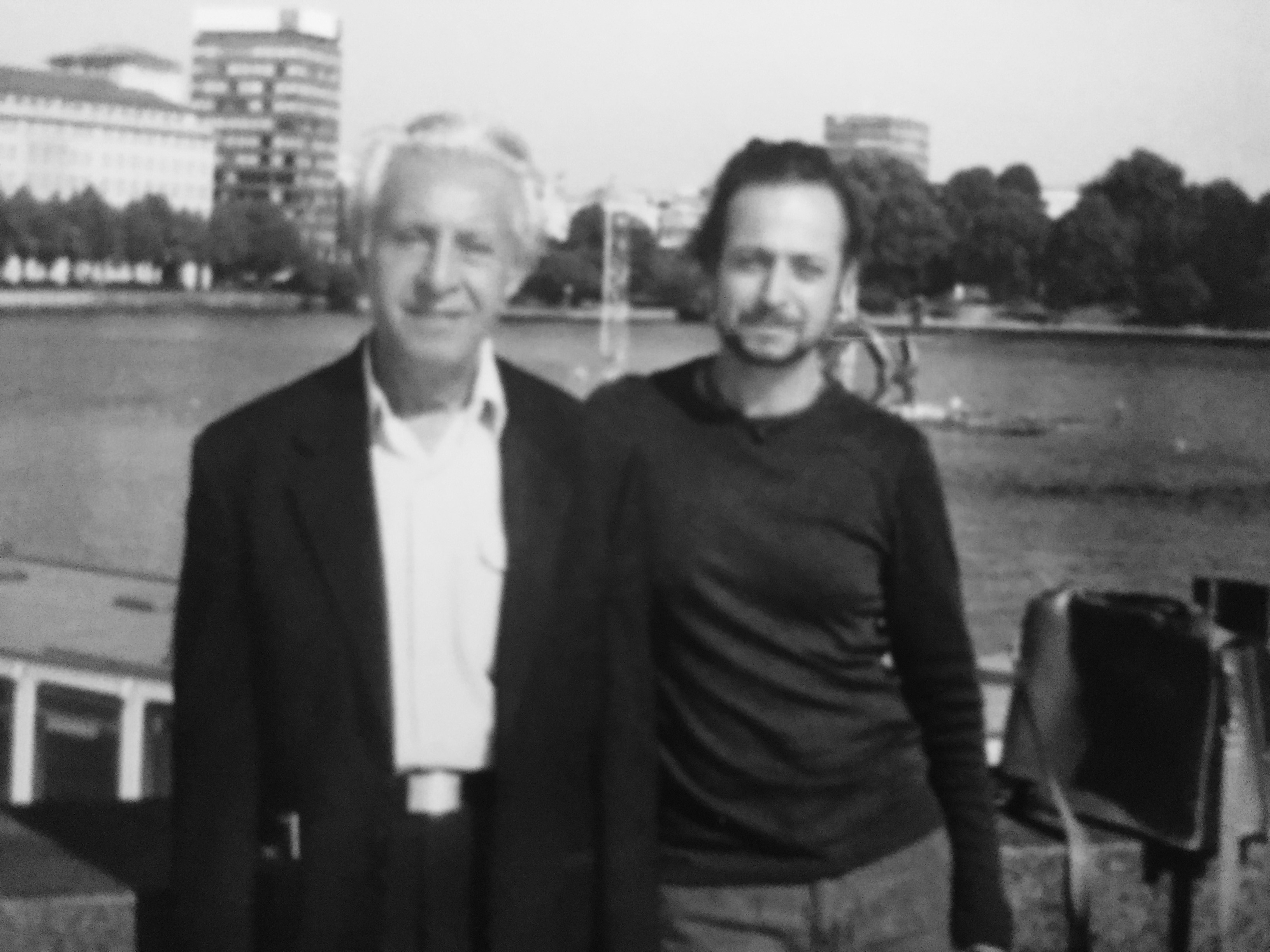 امنون نتصر، هامبورگ ۲۰۰۷ میلادی